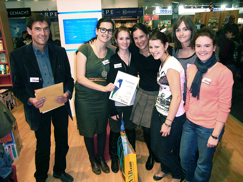 Leseclubmitglieder überreichen auf der Frankfurter Buchmesse 2010 Isabel Abedi (Mitte) die 2. Siegerurkunde